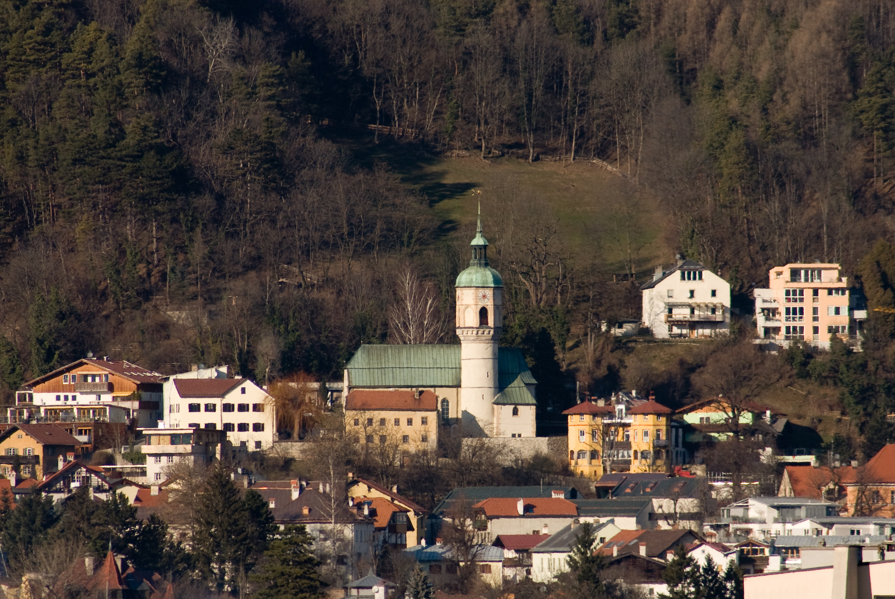 Alte Hoettinger Kirche, Ansicht von Wilten